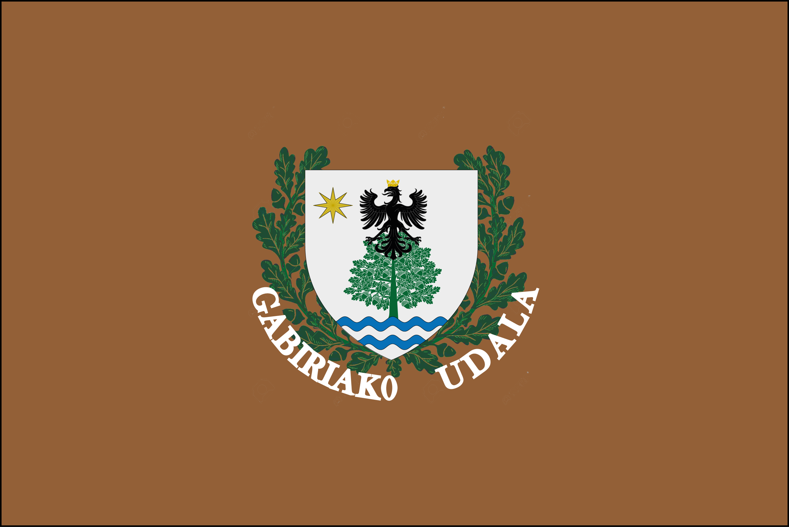 Bandera municipal de Gabiria, Guipúzcoa, con Corona de Roble